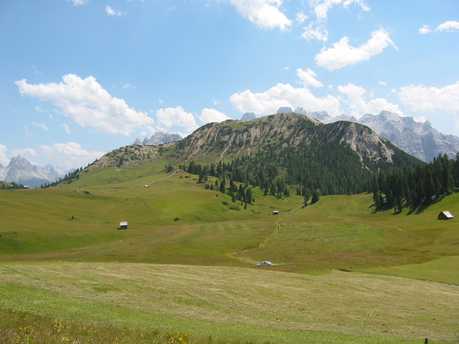 Plätzwiese:links im Hintergrund die Cadinspitzen, rechts hinter dem Knollkopf die Cristallogruppe mit Piz Popena, Cristallo, Cima di Mezzo, Cristallino, Cresta Bianca, Vecchio del Forame